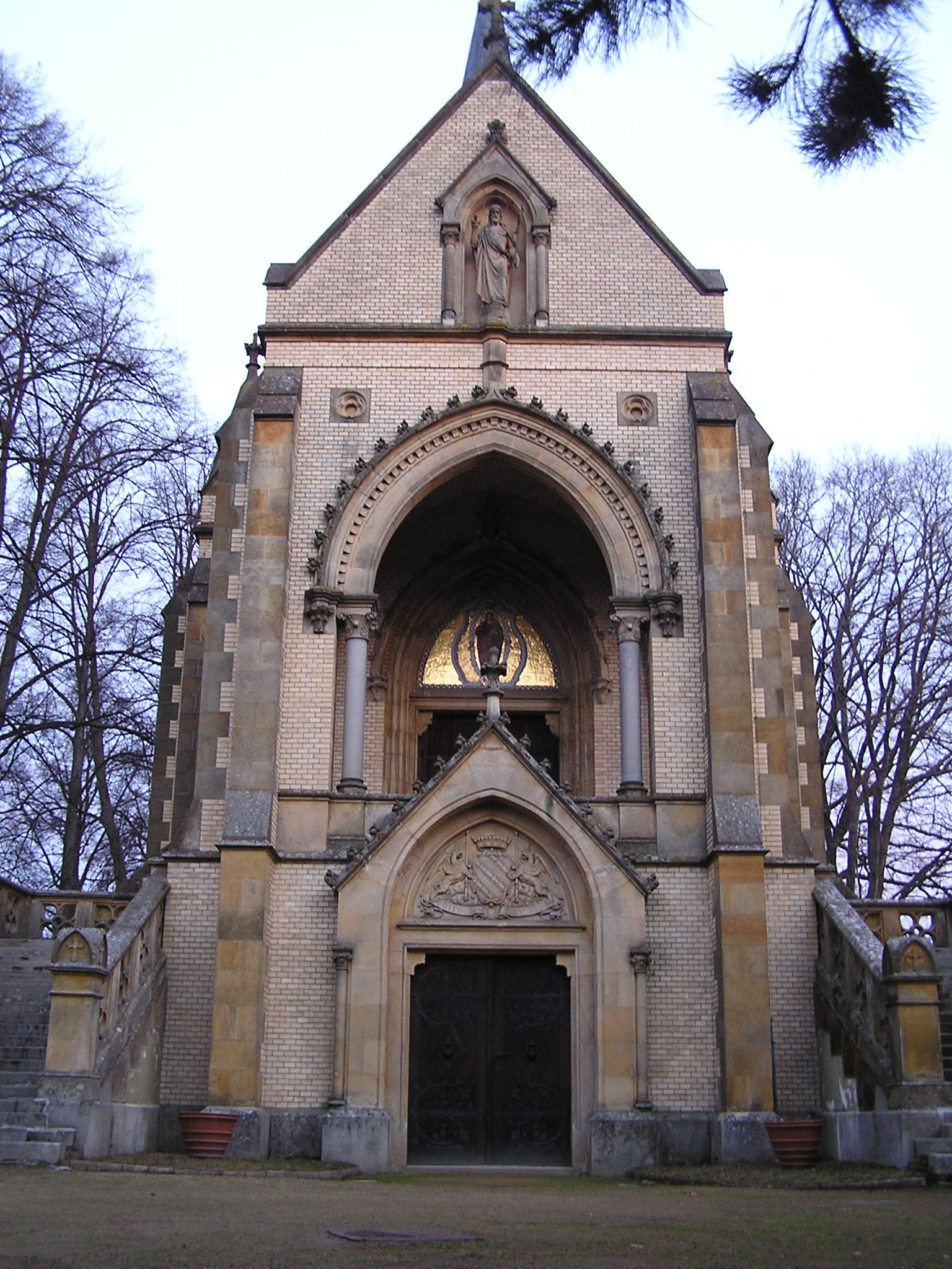 Hrobka Buquoyská (Nové Hrady), Nové Hrady